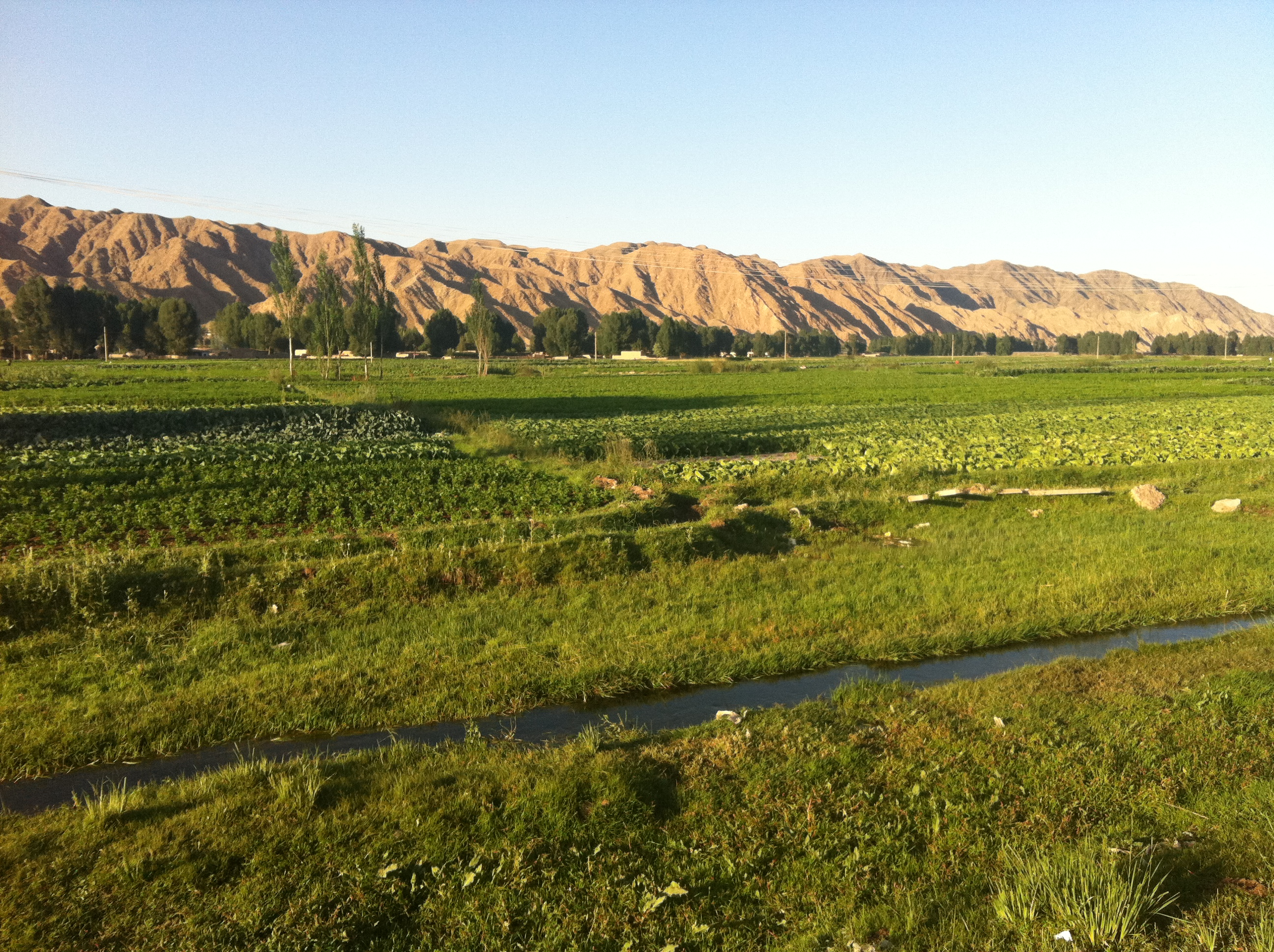 Yongchang, Jinchang, Gansu, China